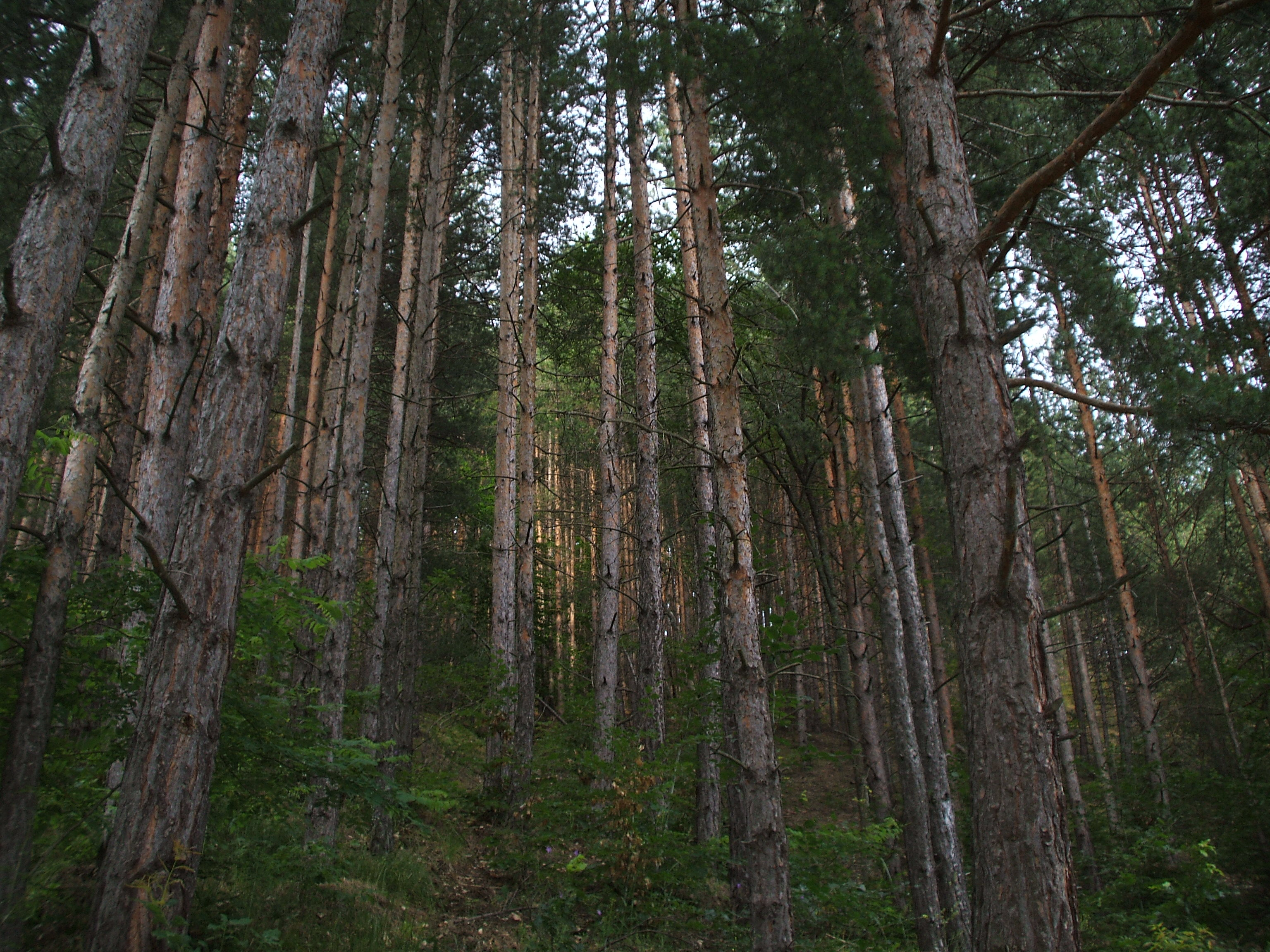 Борова гора в Западна Стара планина.